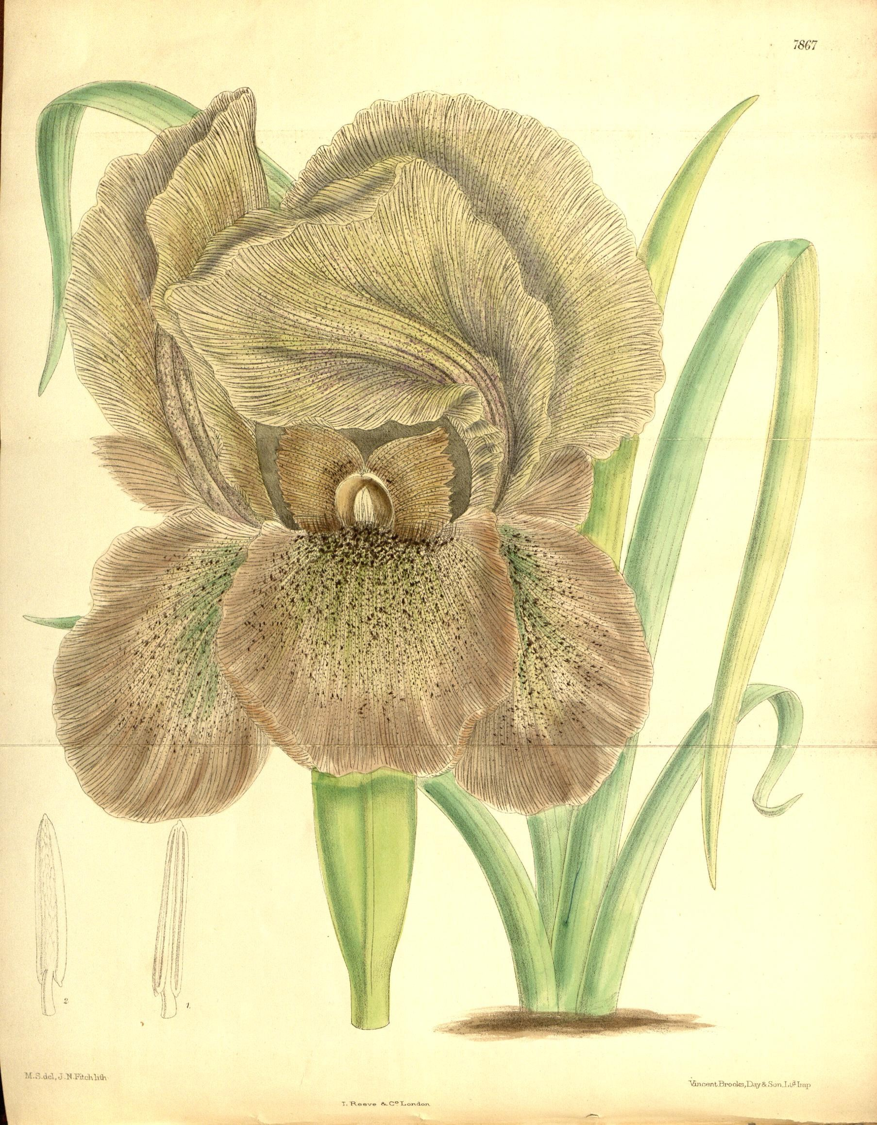 Iris gatesii